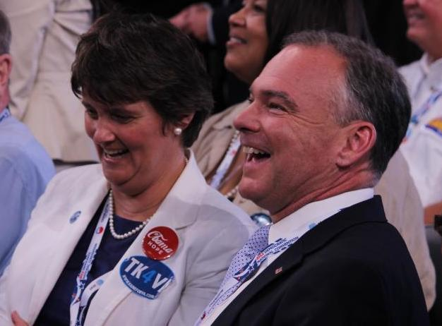 2012dncconvention-190